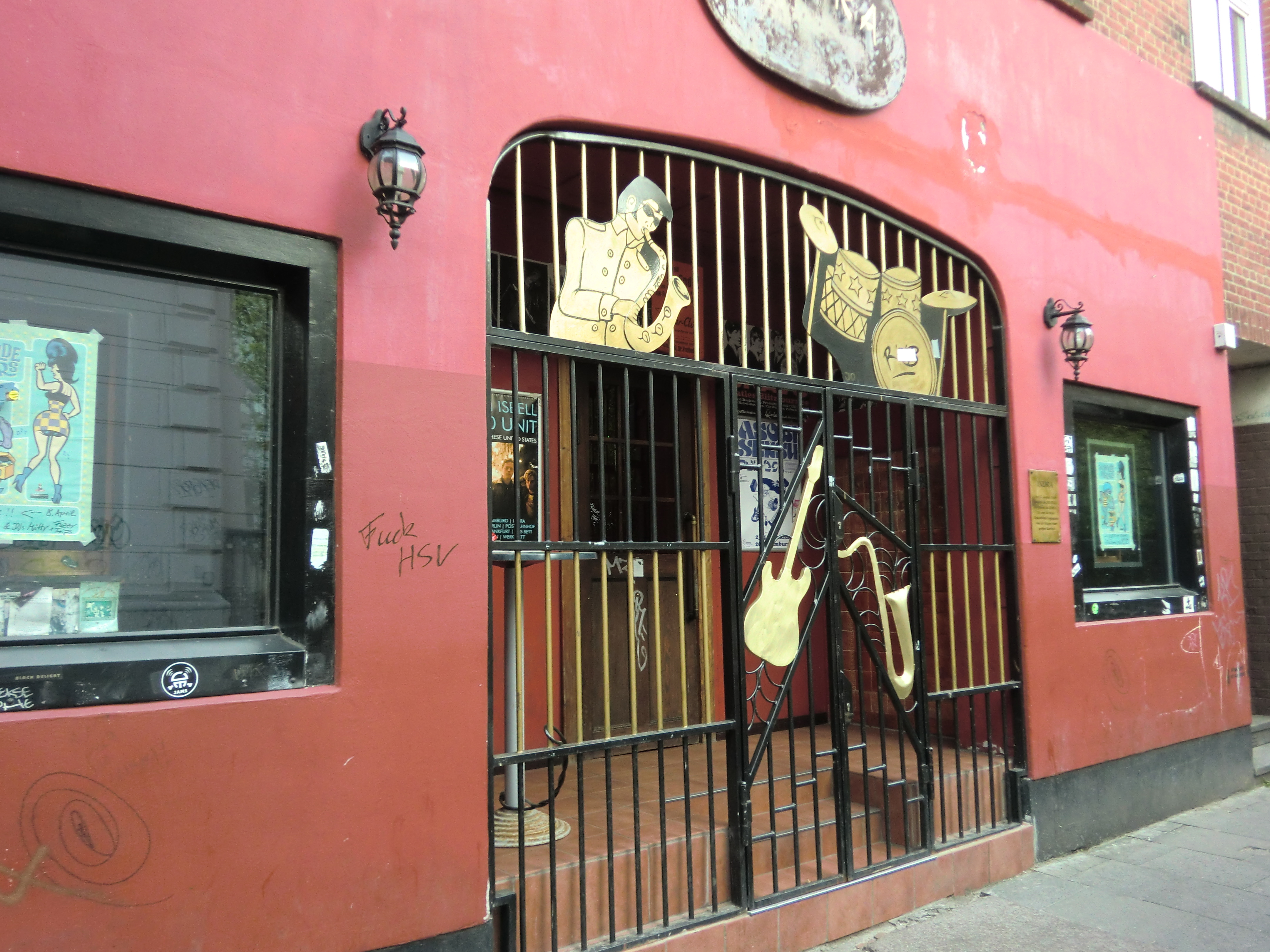 Indra Hamburg, Große Freiheit 64, hier spielten die Beatles vom 17.08. bis zum 03.10.1960.